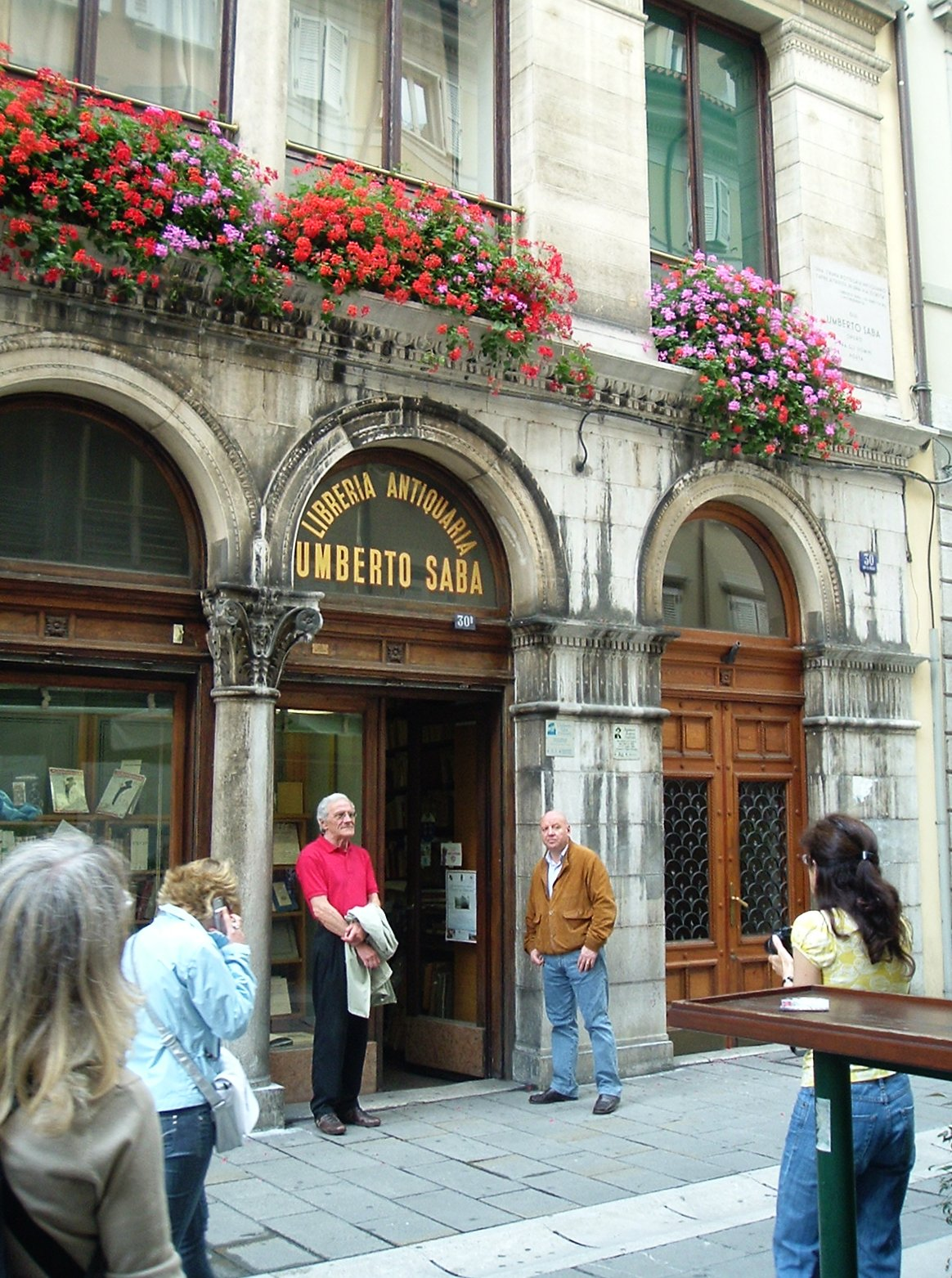 Libreria Umberto Saba a Trieste in Italia